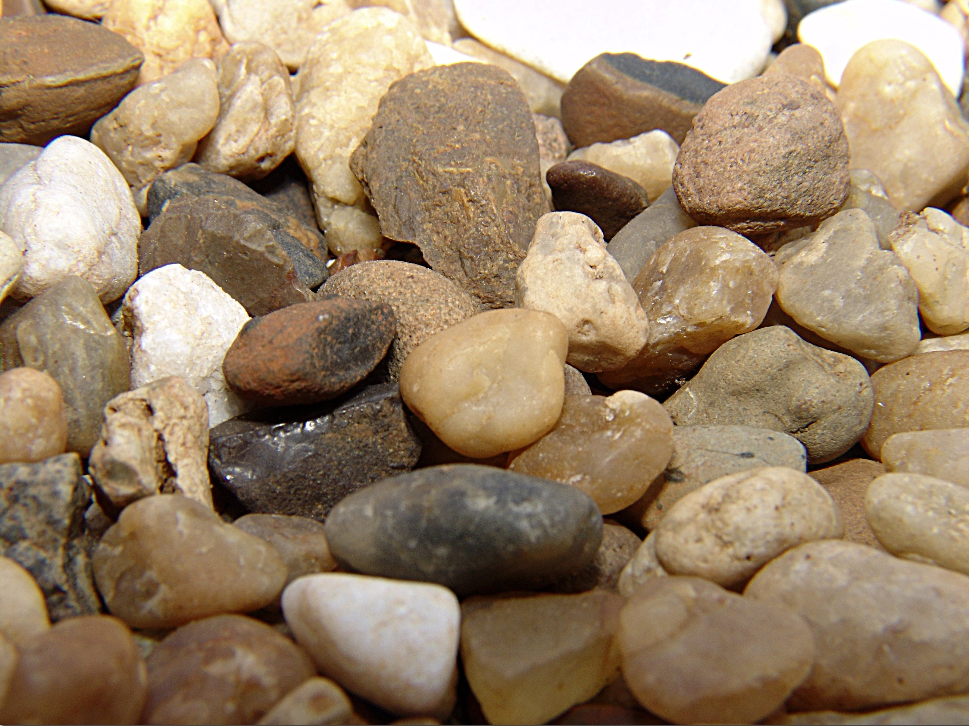 Seixos, pedras, pedregulhos